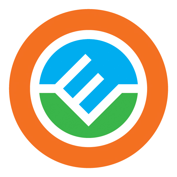 Logo CEFF